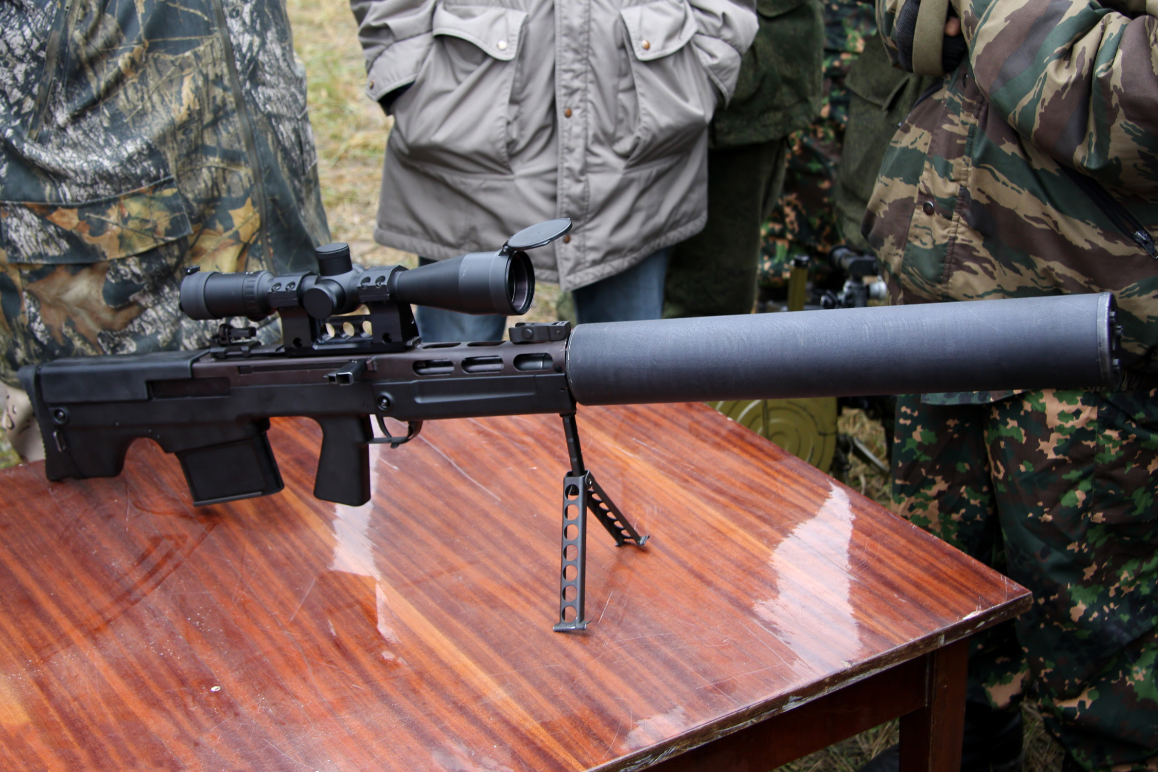 Винтовка снайперская специальная крупнокалиберная бесшумная ВКС - Интерполитех-2011Tiếng Việt: VKS sniper rifle - Interpolitex-2011